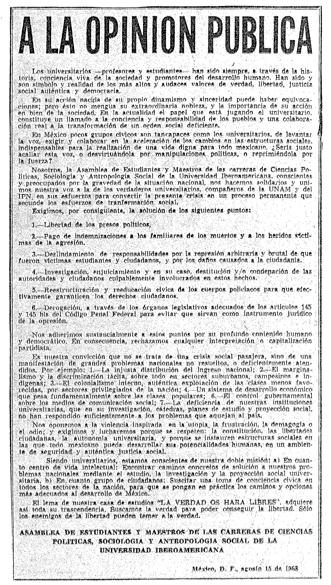 Comunicado de la comunidad académica y estudiantil de La Ibero